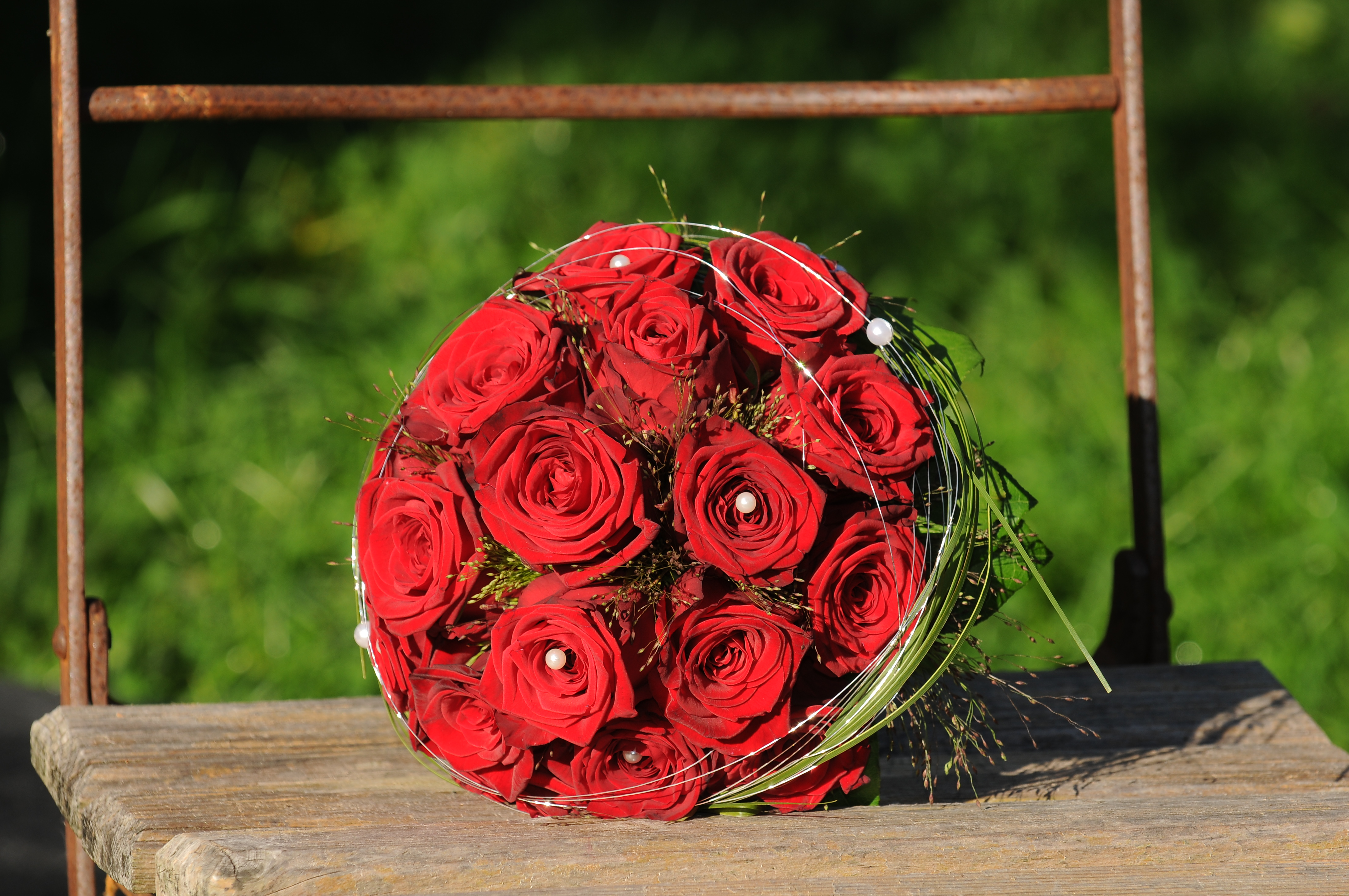 Hochzeitsstrauß anlässlich eine Hochzeit.